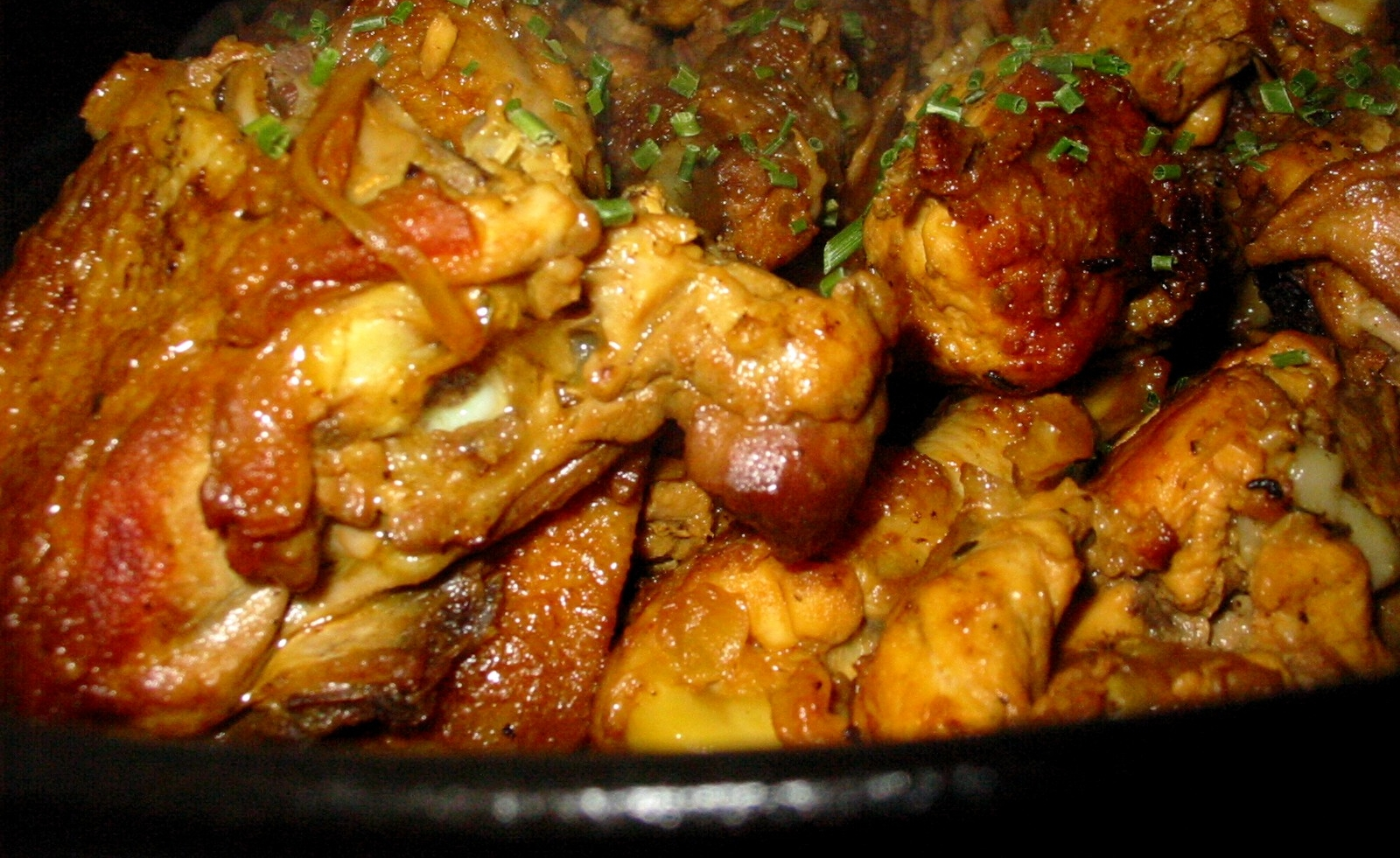 Cari de poulet pays